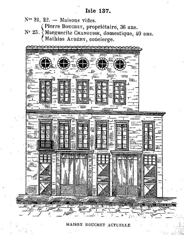 Croquis de la Maison Bouchet à Avignon